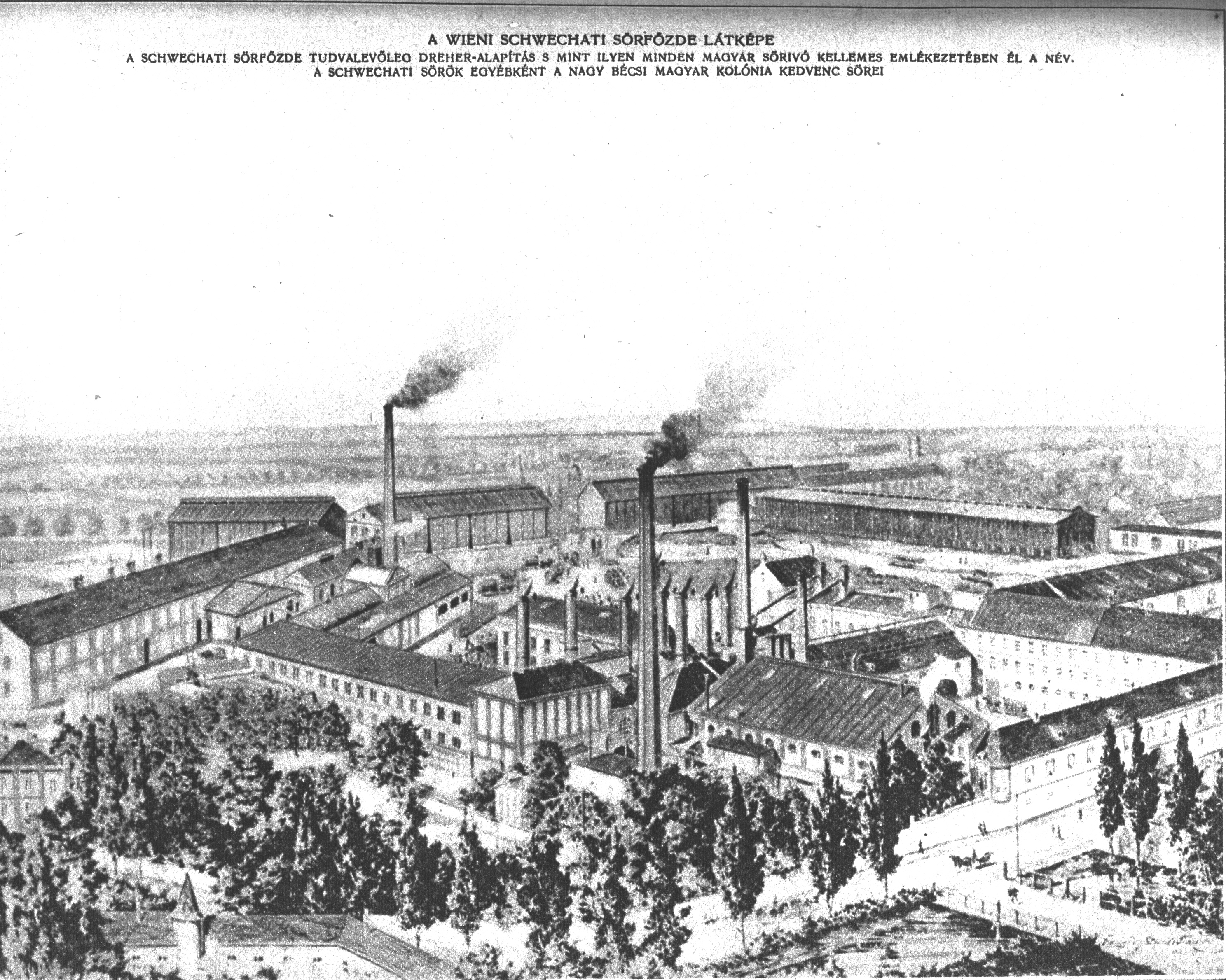 Franz Anton Dreher, 1796-ban megvásárolta a Klein-Schwechati Városi Serházat. Ez annak a látképe.